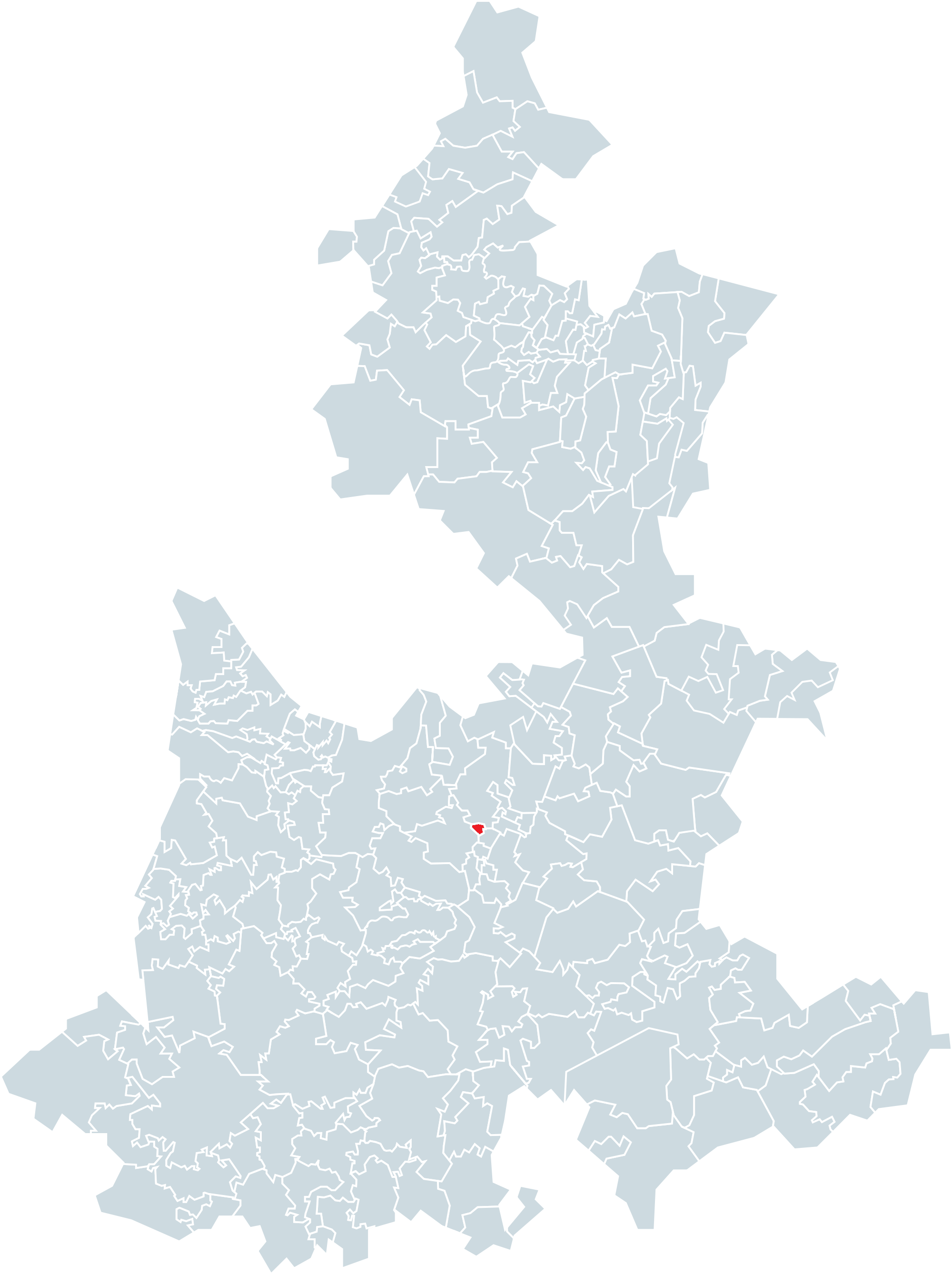 Municipio de Mixtla